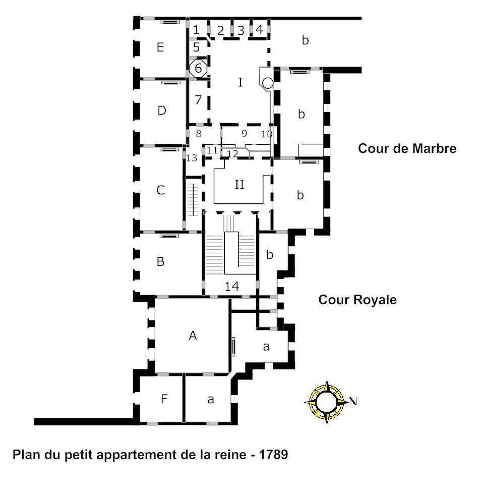 Plan du petit appartement de la reine en 1789 : les cabinets intérieurs du premier étage. 2 service de la reine 3 escalier à l’appartement de la reine au rez-de-chaussée 4 passage 5 cabinet de la chaise 6 cabinet de la Méridienne 7 bibliothèque 8 supplément de la bibliothèque 9 grand cabinet intérieur 10 arrière cabinet 11 pièce des bains 12 chambre des bains 13 antichambres 14 escalier de la reine A-F grand appartement de la reine a appartement du duc de Duras b appartement du roi I cour de Monseigneur II cour de Monsieur